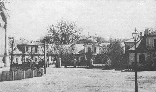 Губернатарскі дом на Дварцовай плошчы Гродна. Помнік архітэктуры 18 ст. на тэрыторыі Гарадніцы (раён плошчы з назвай Дварцовая, Леніна, Тызенгауза і інш.). Вядомы пад назвай Палац Тызенгауза. Разбураны ў гады 1-й Сусветнай вайны.